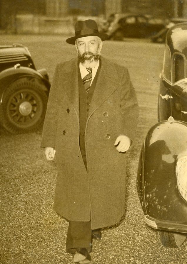 Marx Dormoy en mars 1937. Inscription au verso : Conseil de cabinet à l'Hôtel Matignon après les sanglantes bagarres de Clichy.